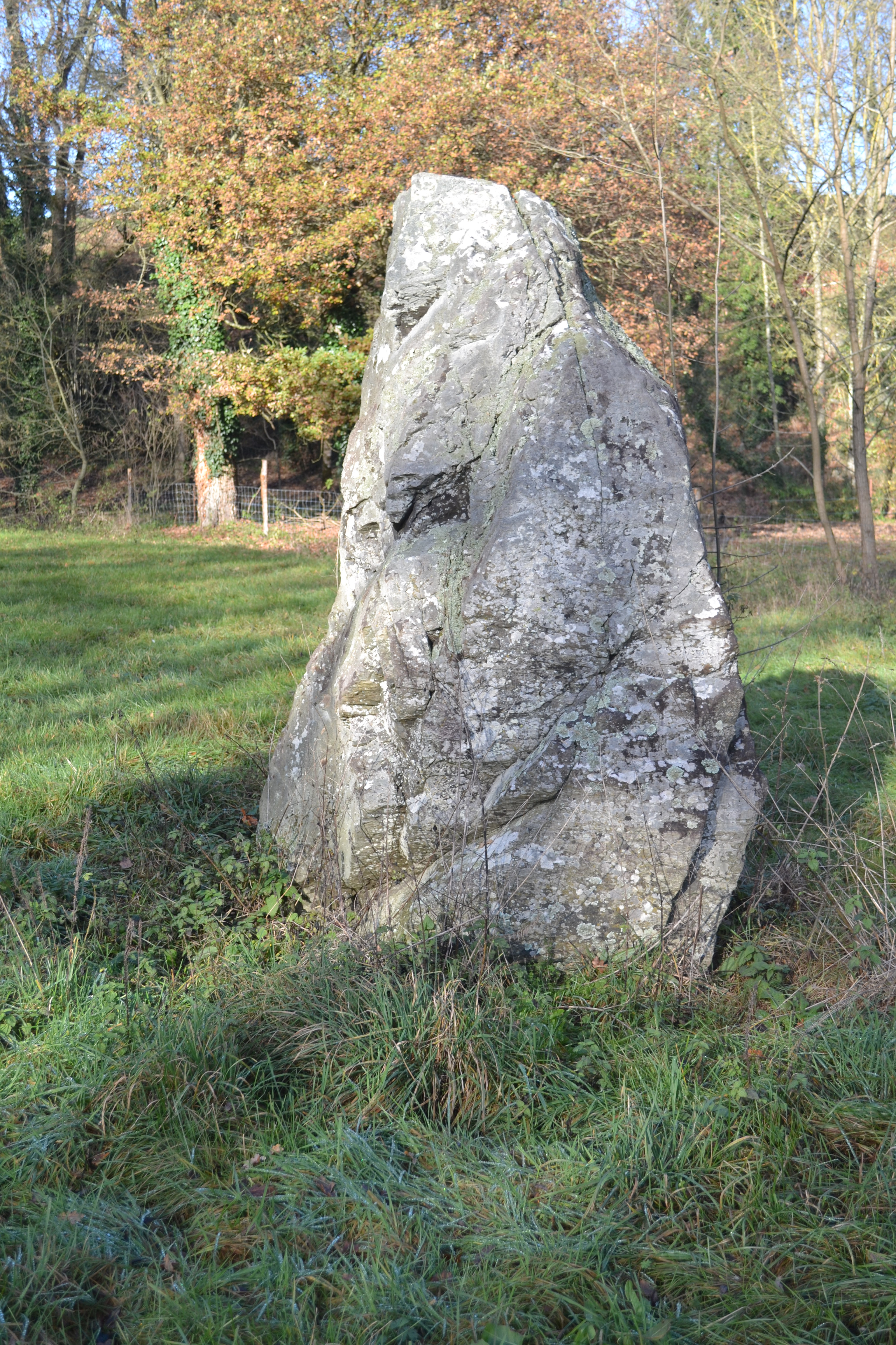 Menhir de la Limouzinière à Chauché (85).